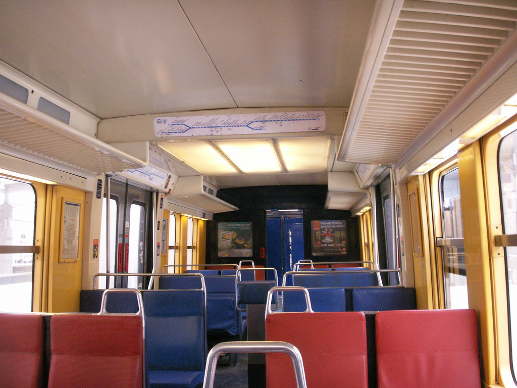 Intérieur rame MI79 RER ligne B Paris France